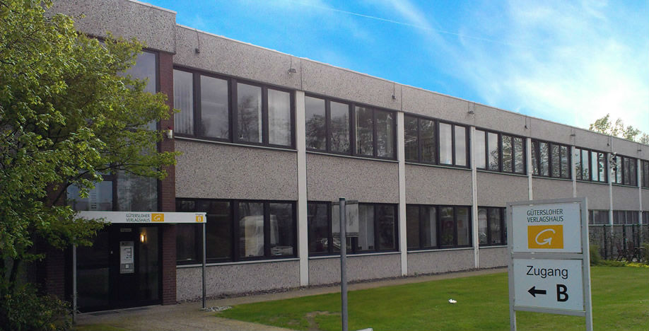 Zentrale des Gütersloher Verlagshauses in Gütersloh